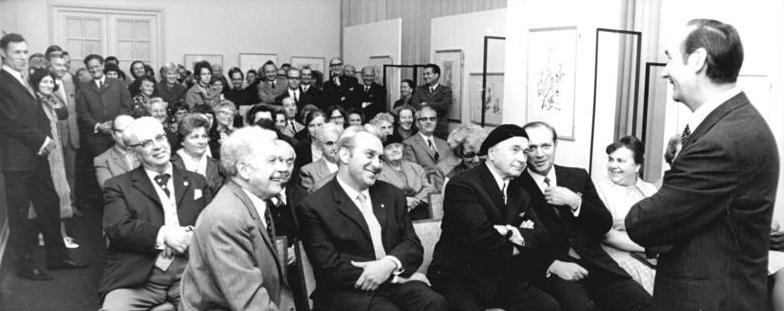 ADN-ZB-Franke-21-9-71-ba Berlin: Ausstellung des sowjetischen Künstlers A.F. Pachomow eröffnet - Gemälde, Grafiken und Zeichnungen des sowjetischen Künstlers Alexej Fjodorowitsch Pachomow sind in einer Ausstellung zu sehen, die heute (21.9.) in den Räumen der Deutschen Akademie der Künste zu Berlin von Professor Werner Klemke (r), Sekretär der Sektion Bildende Kunst, eröffnet wurde. Bei der Eröffnung waren der Autor der Arbeiten A.F. Pachomow (1. Reihe, 3.v.l.), der 1. Sekretär der Bezirksleitung Berlin der SED, Konrad Naumann (1. Reihe, 2.v.l.), Prof. Dr. Hans Rodenberg, Mitglied des ZK der SED und Mitglied des Staatsrates der DDR (vorn links), und Dr. Lothar Bolz, Präsident der Gesellschaft für Deutsch-Sowjetische Freundschaft (2. Reihe, l.), zugegen.